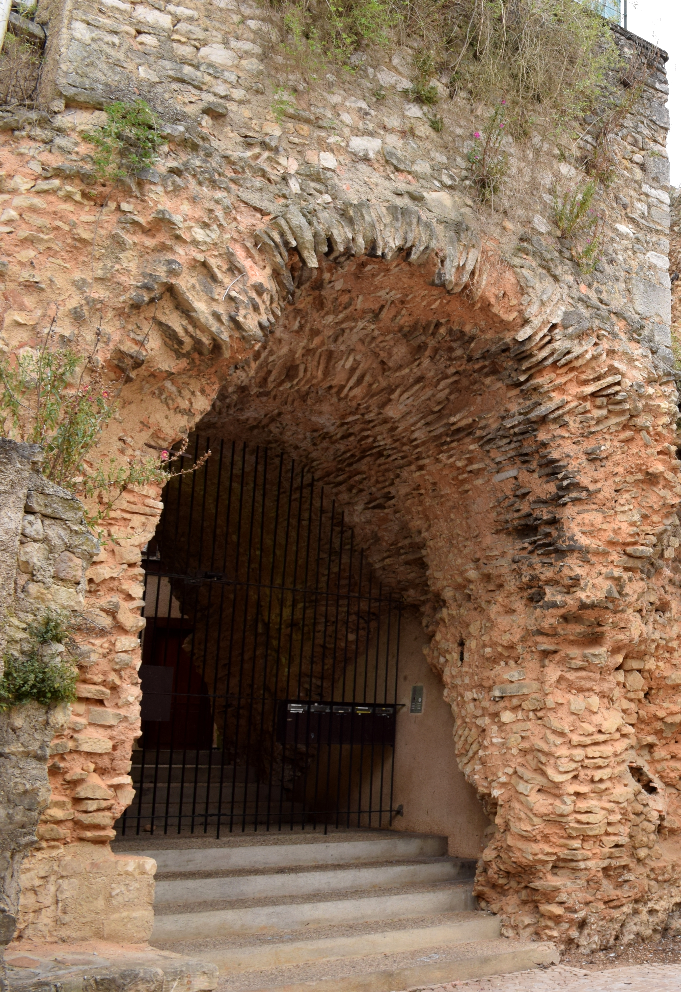 Vestiges de l'amphithéâtre de Poitiers. .